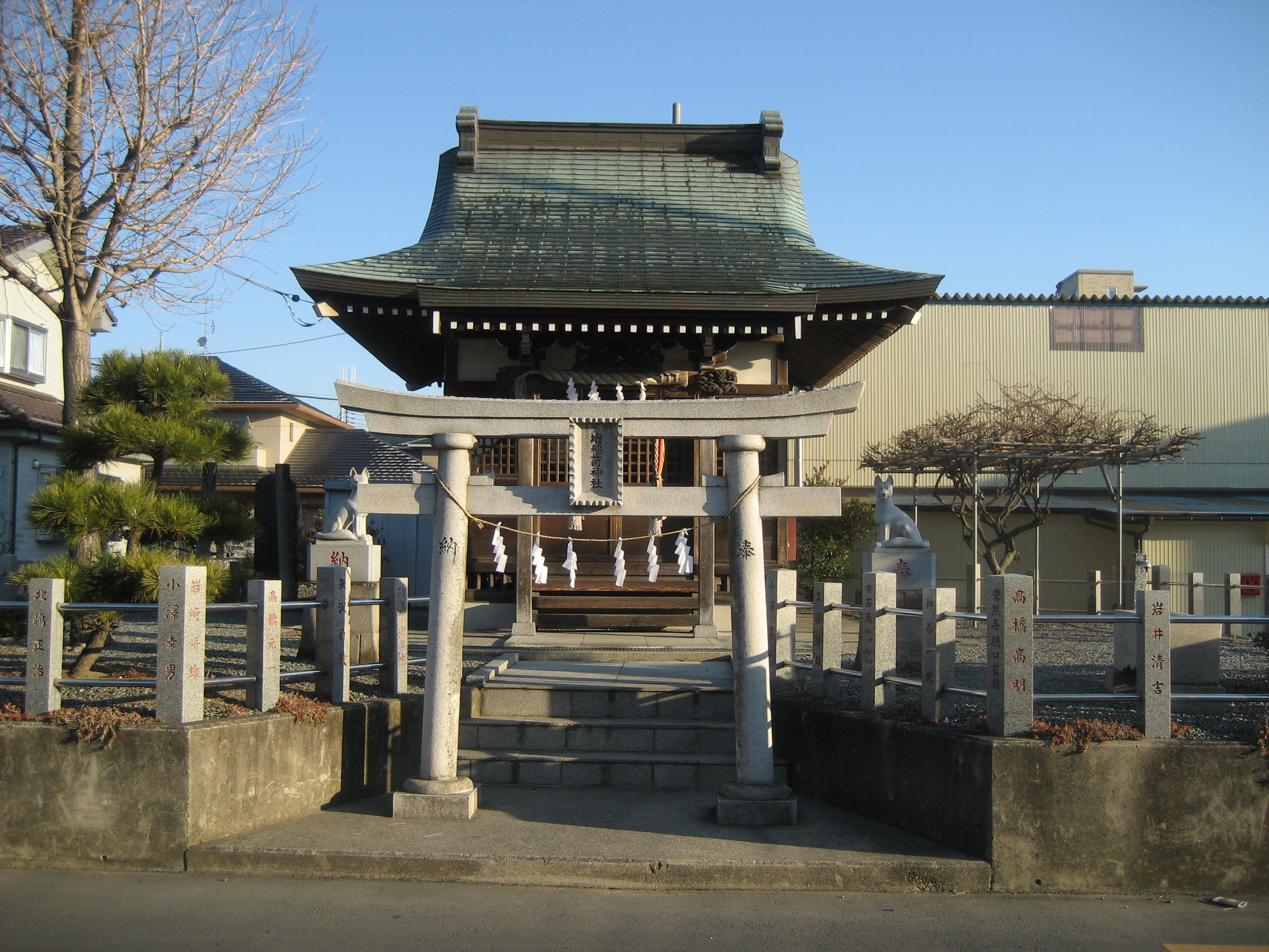 埼玉県八潮市垳に所在する垳稲荷神社